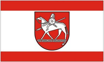 Flagge vom Landkreis Börde